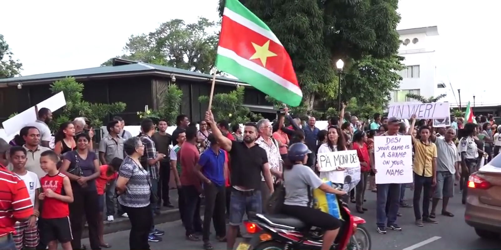 Protesten van Wij Zijn Moe, Paramaribo, Suriname